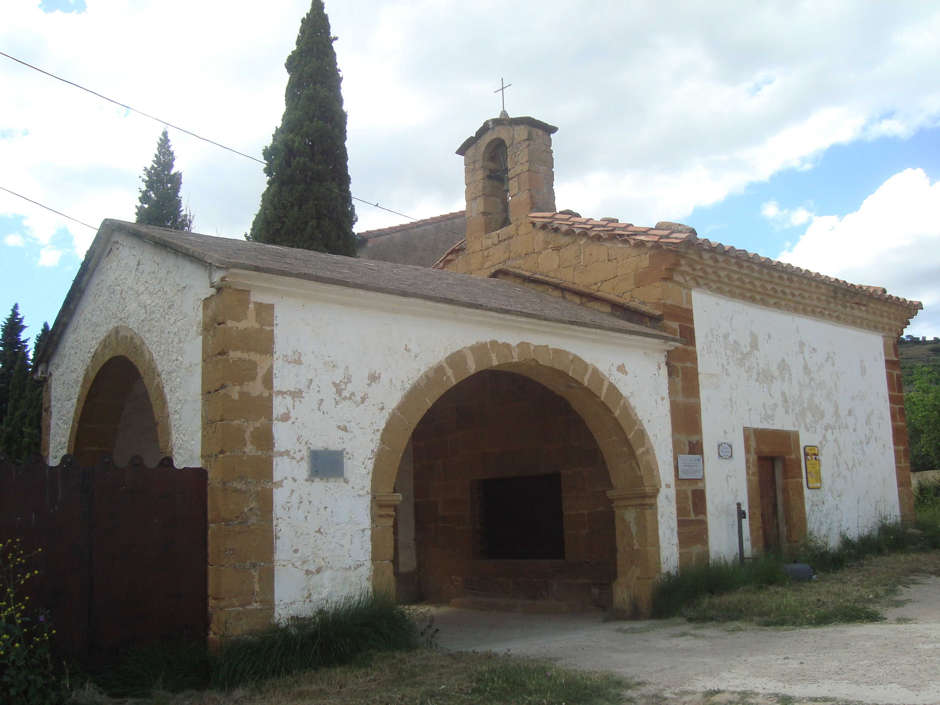 Ermita de Loreto (Benassal) 02.026-007.